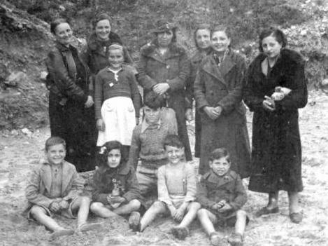 Placeres Castellanos, de pé á esquerda, no refuxio de Séte, Francia, en 1939, antes de saír para o campo de internamento